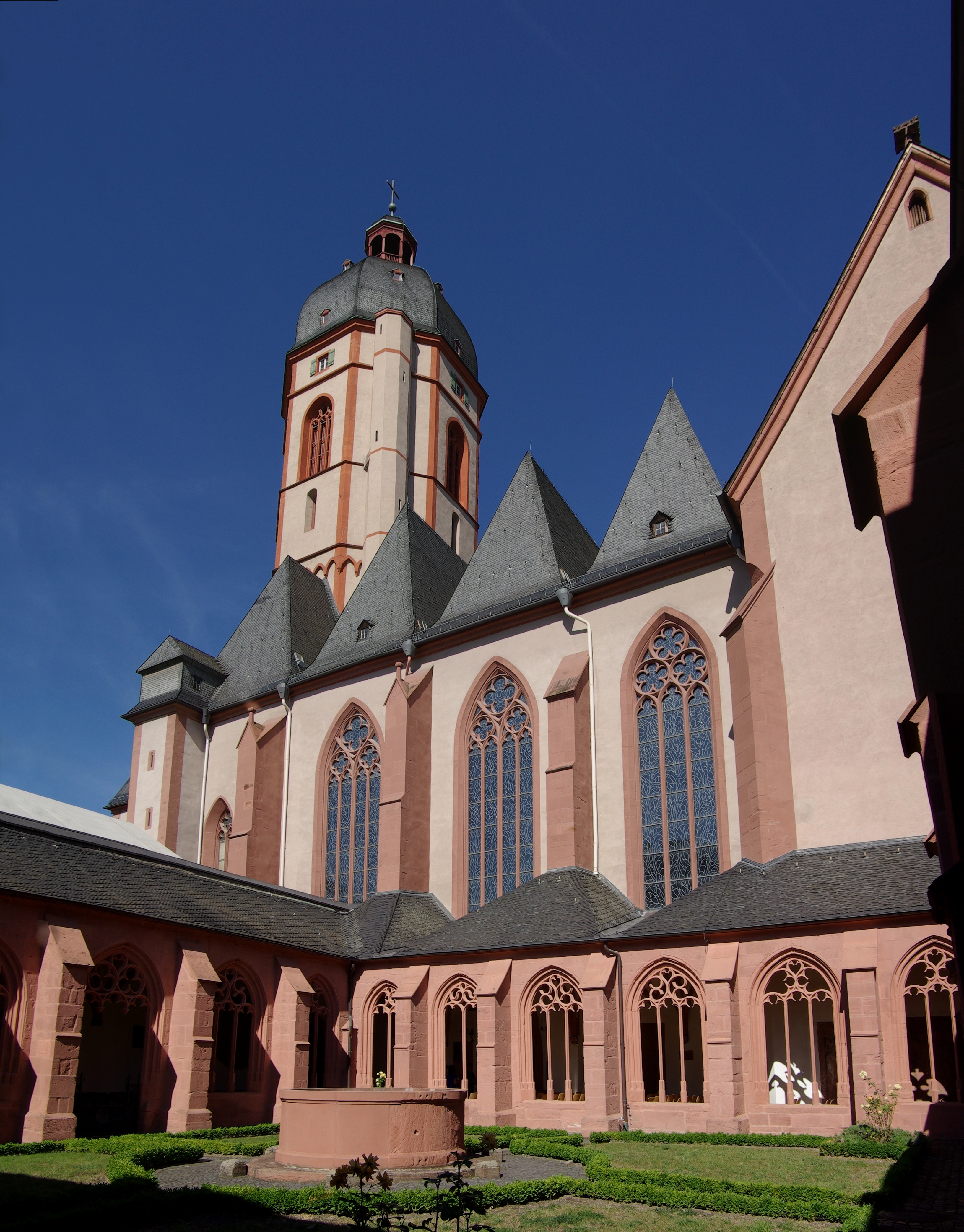 Mainz, St. Stephan